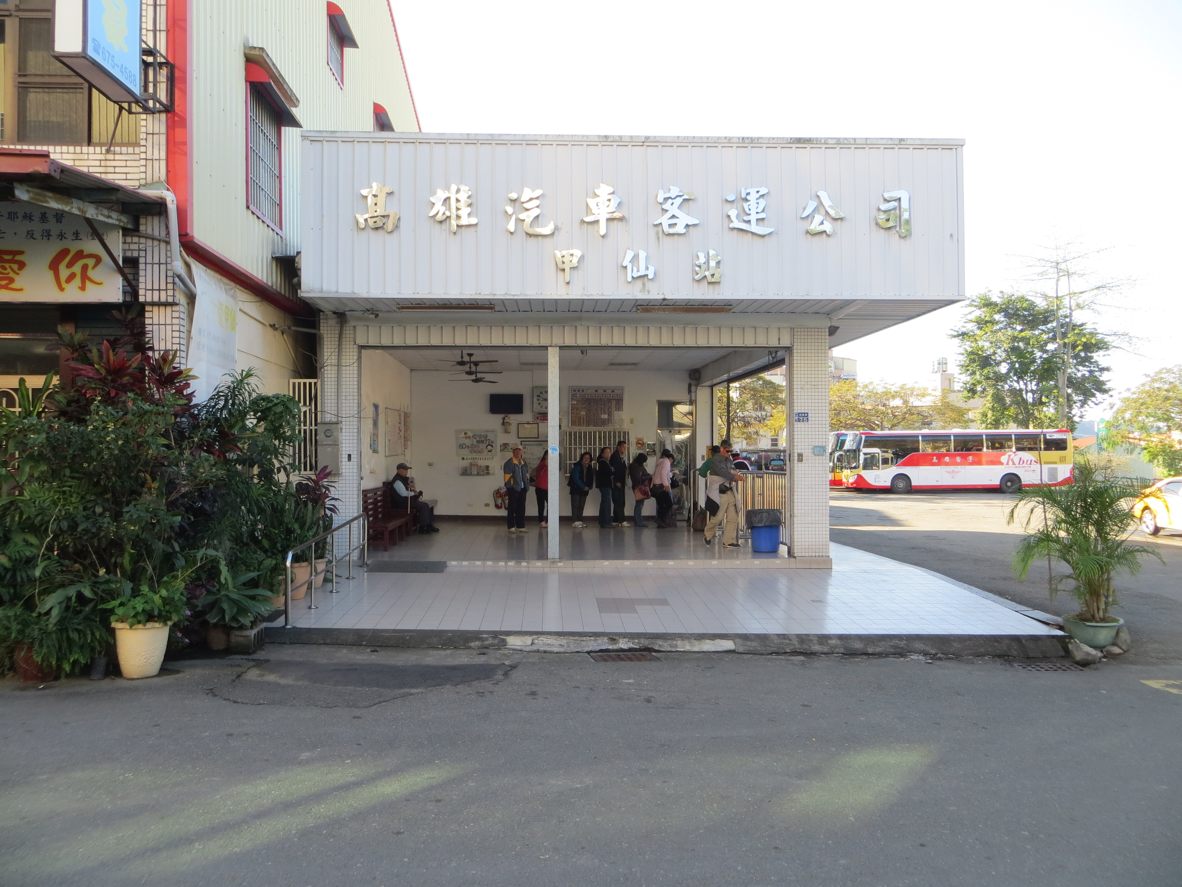 高雄市甲仙區高雄客運甲仙站，是甲仙街區主要的大眾運輸轉運結點。此為自林森路拍攝其正面，建物內盡頭為售票櫃檯，右側為上車站台。站內有一排隊人潮，準備於8:50搭乘8029路線前往寶來溫泉區。2016年1月9日